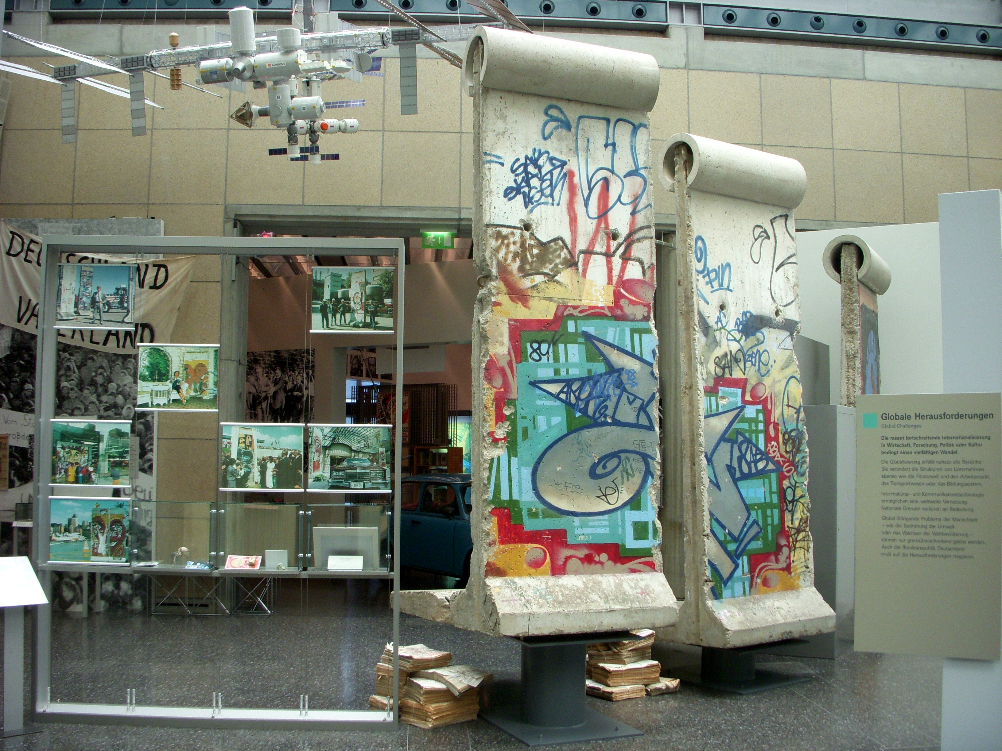 "Haus der Geschichte" in Bonn, Berliner Mauer